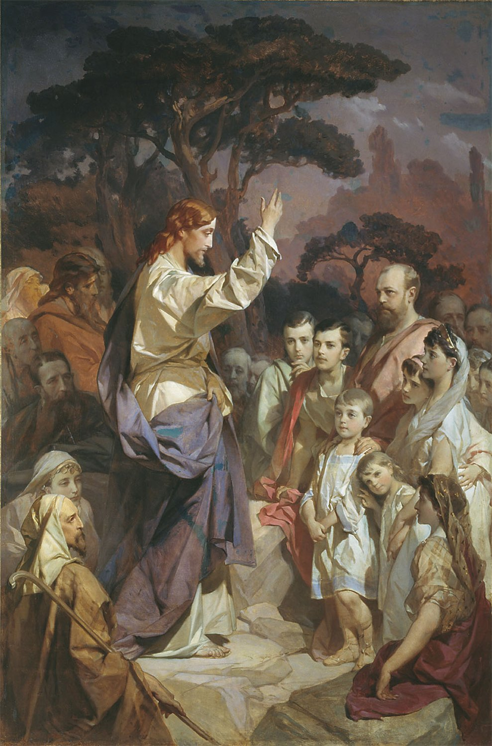 Макаров И.К. Нагорная проповедь 1889 Семья Александра III перед Христом "Благословение Господне на вас"